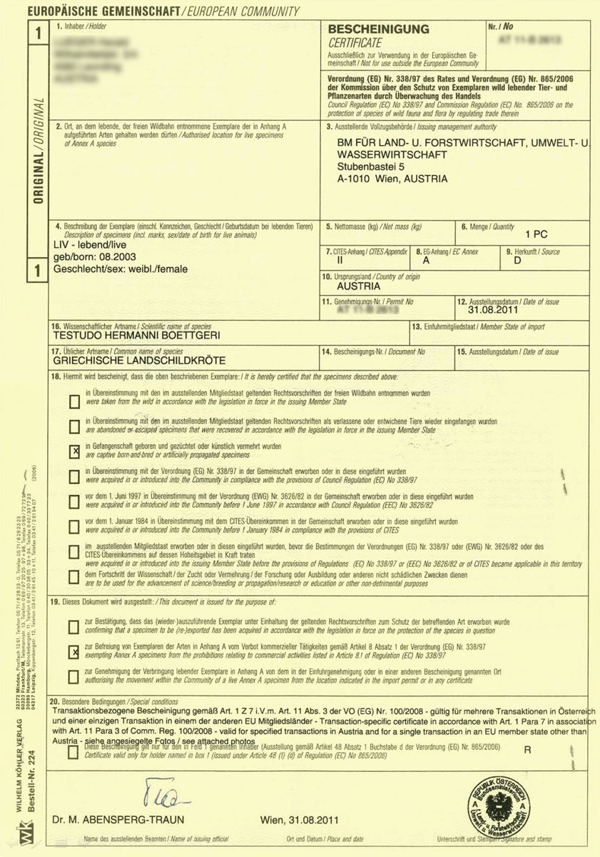 CITES Testudo Hermani (Österreich)